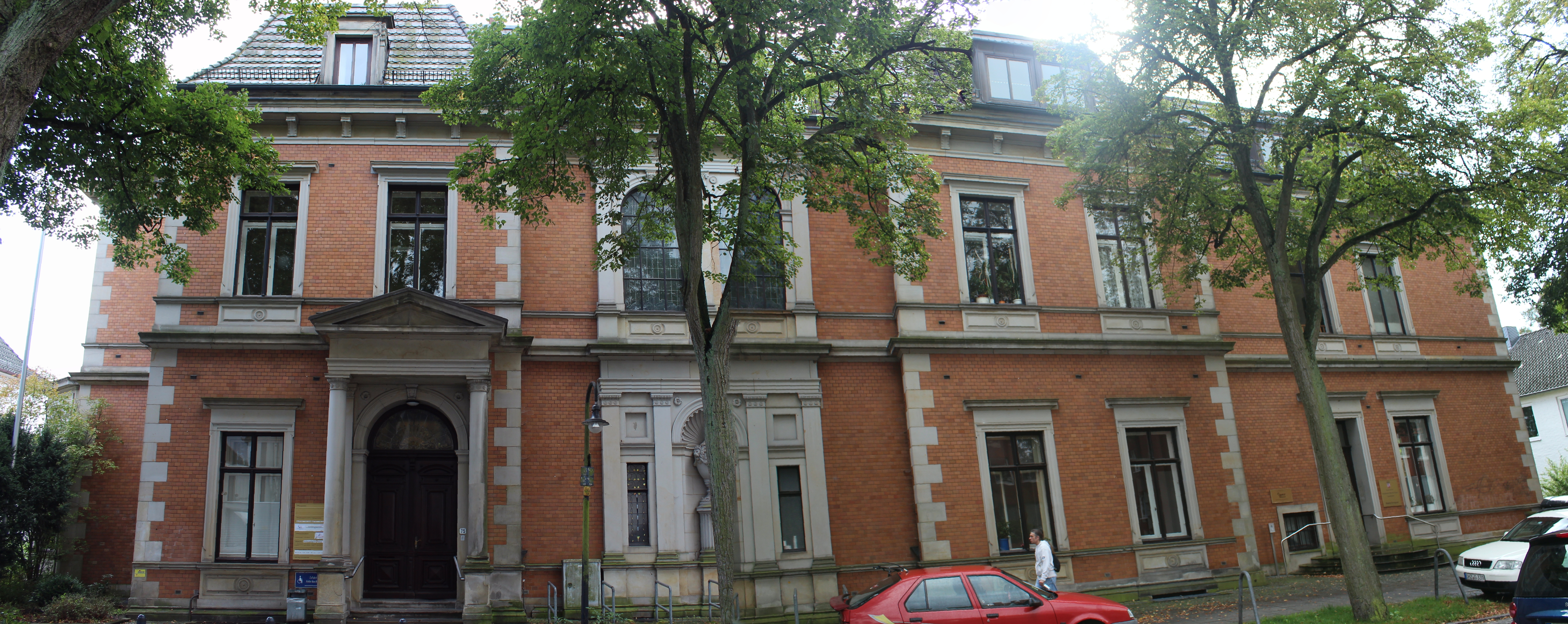 Villa Fritze in Bremen, Weserstraße 74, 75.Das abgebildete Objekt ist ein geschütztes Kulturdenkmal in der Freien Hansestadt Bremen, mit der Nr. 1857 beim Landesamt für Denkmalpflege registriert.